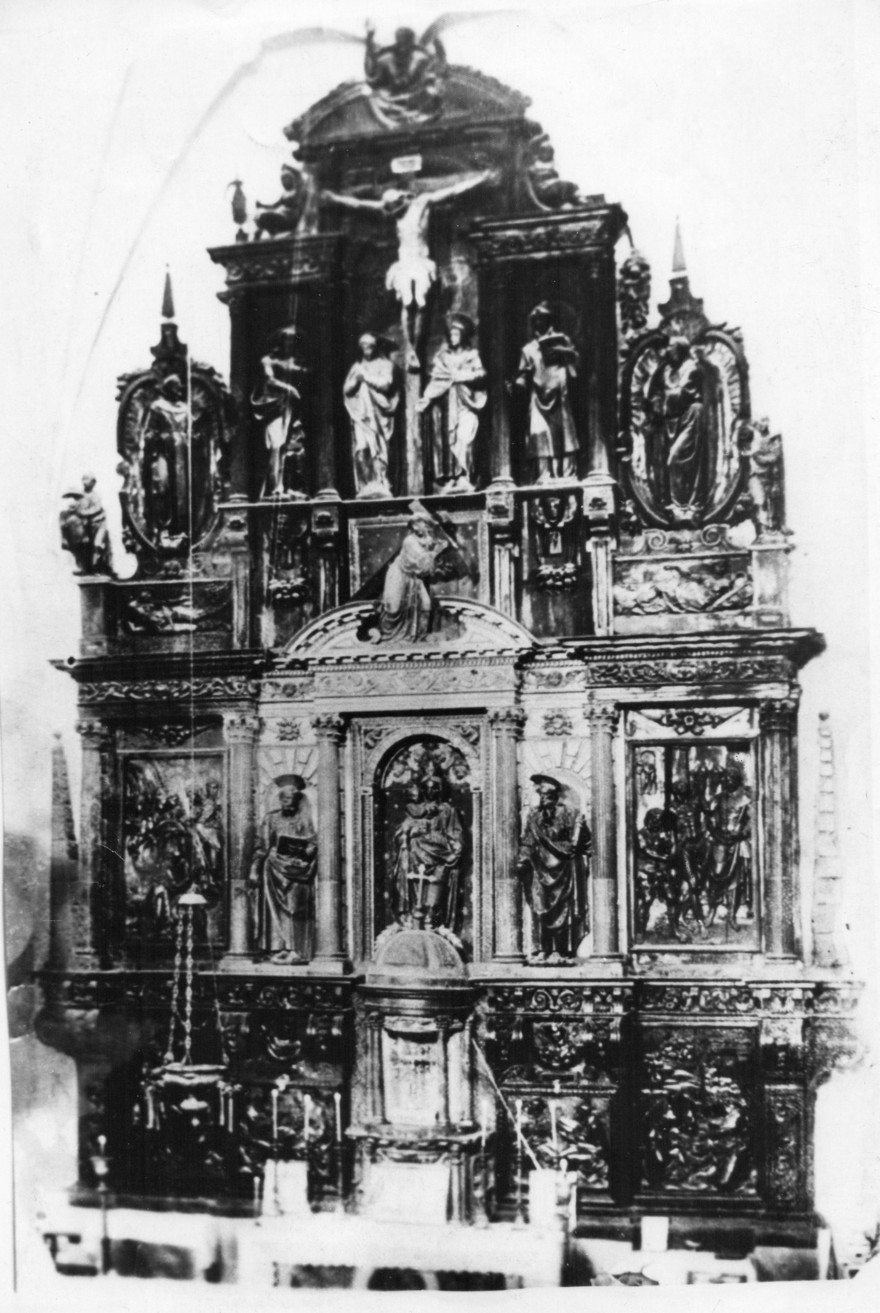 Retablo Villanueva (desaparecido) realizado por Sebastián de Solís a primeros del siglo XVII